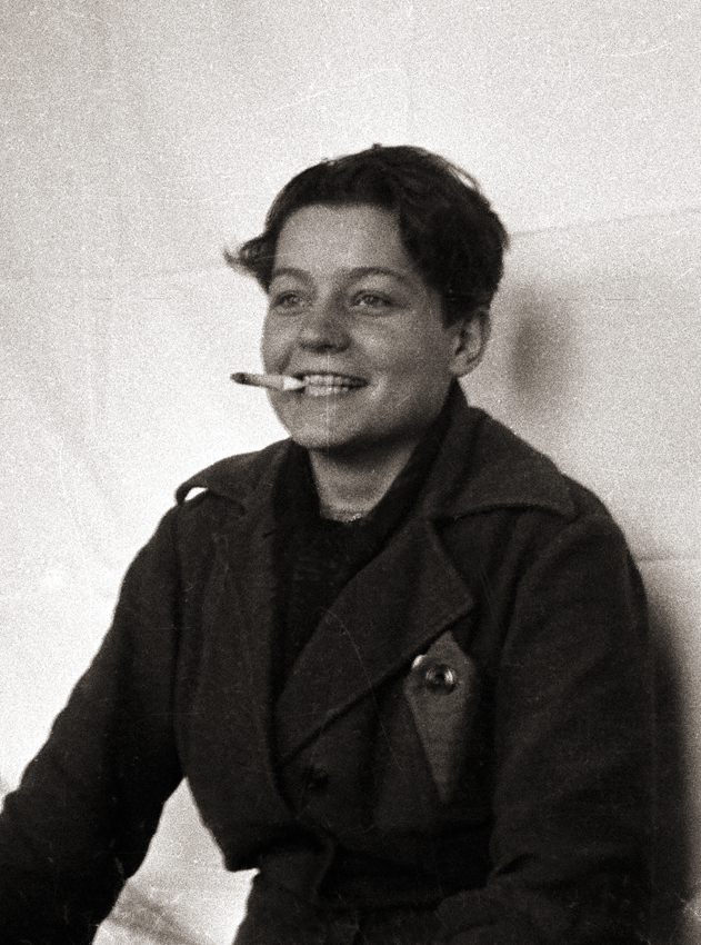 Inge von Wangenheim, Moskau 1930er-Jahre